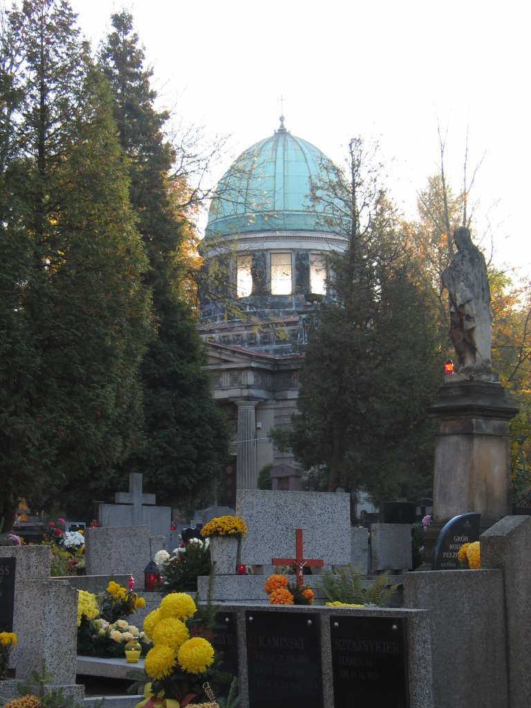 Grobowiec Heinzla w Łodzi